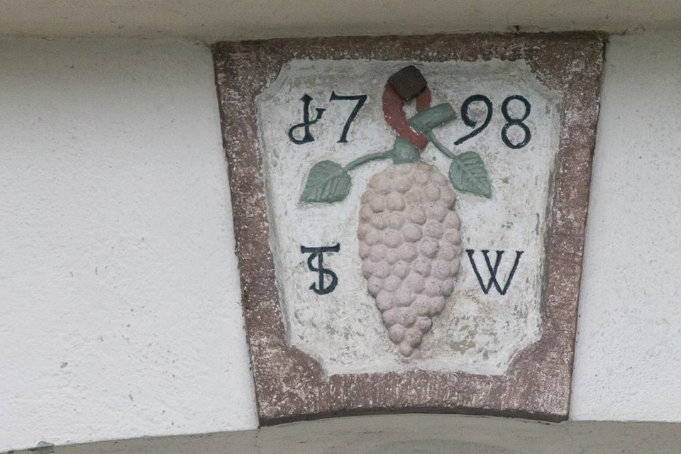 Keilstein